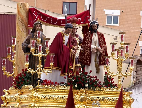 El Paso del Ecce Homo, precioso trono.